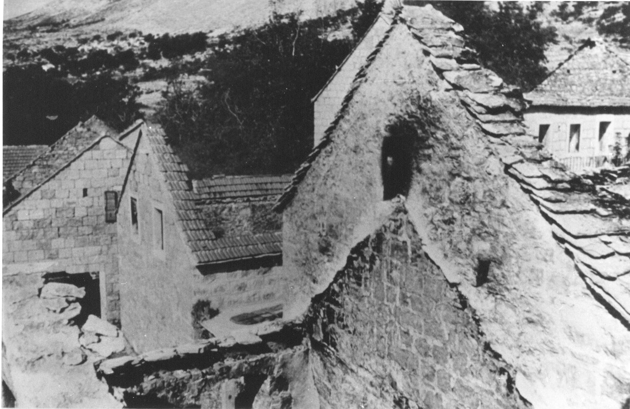 Srpskohrvatski / српскохрватски: Selo Gata spaljeno od četnika, slikano septembra 1943.